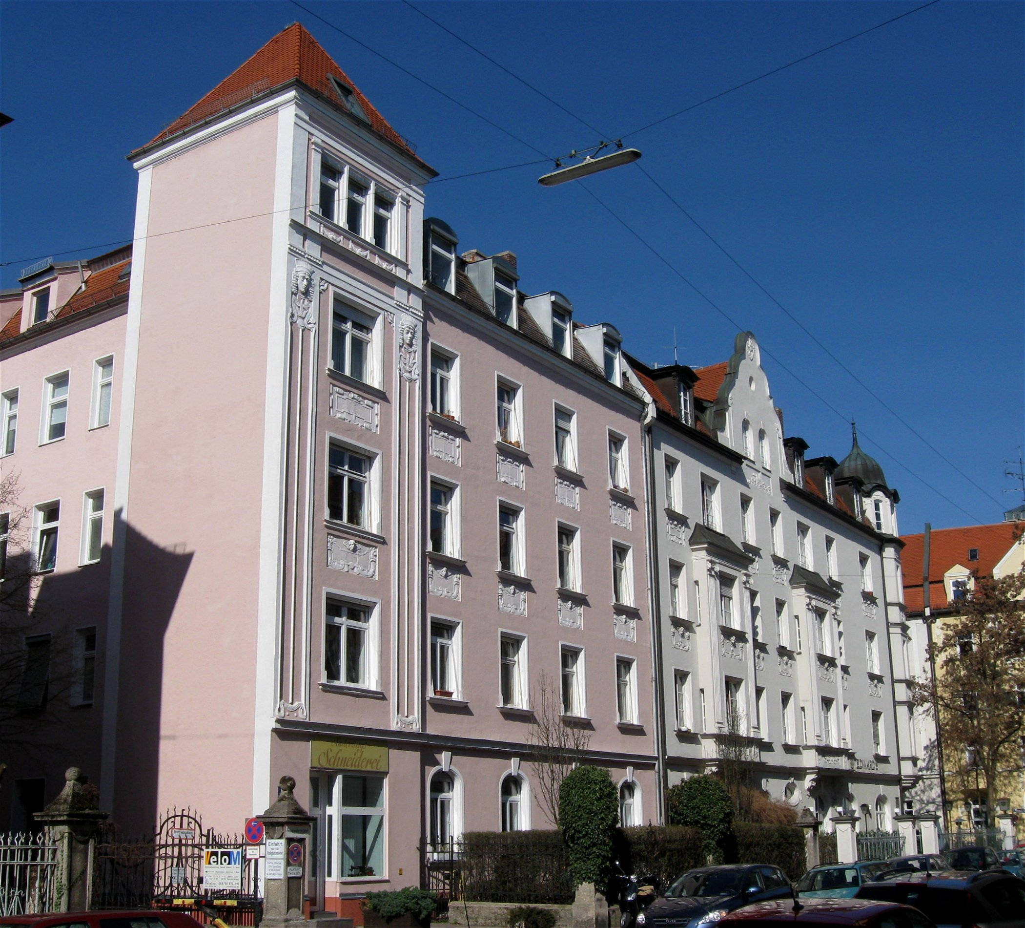 Ysenburgstraße 11; Mietshaus, viergeschossiger Mansardwalmdachbau mit Eckturm und Jugendstildekor, von Konrad Böhm, 1901; mit Einfriedung, bauzeitlich; Gruppe mit Nr. 13. Ysenburgstraße 13; Mietshaus, stattlicher Jugendstilbau, mit Turmerker an der Ecke, drei Erkern, zwei Zwerchgiebeln sowie plastischem und Stuckdekor, 1899-1900 von Georg Müller; Gruppe mit Nr. 11.